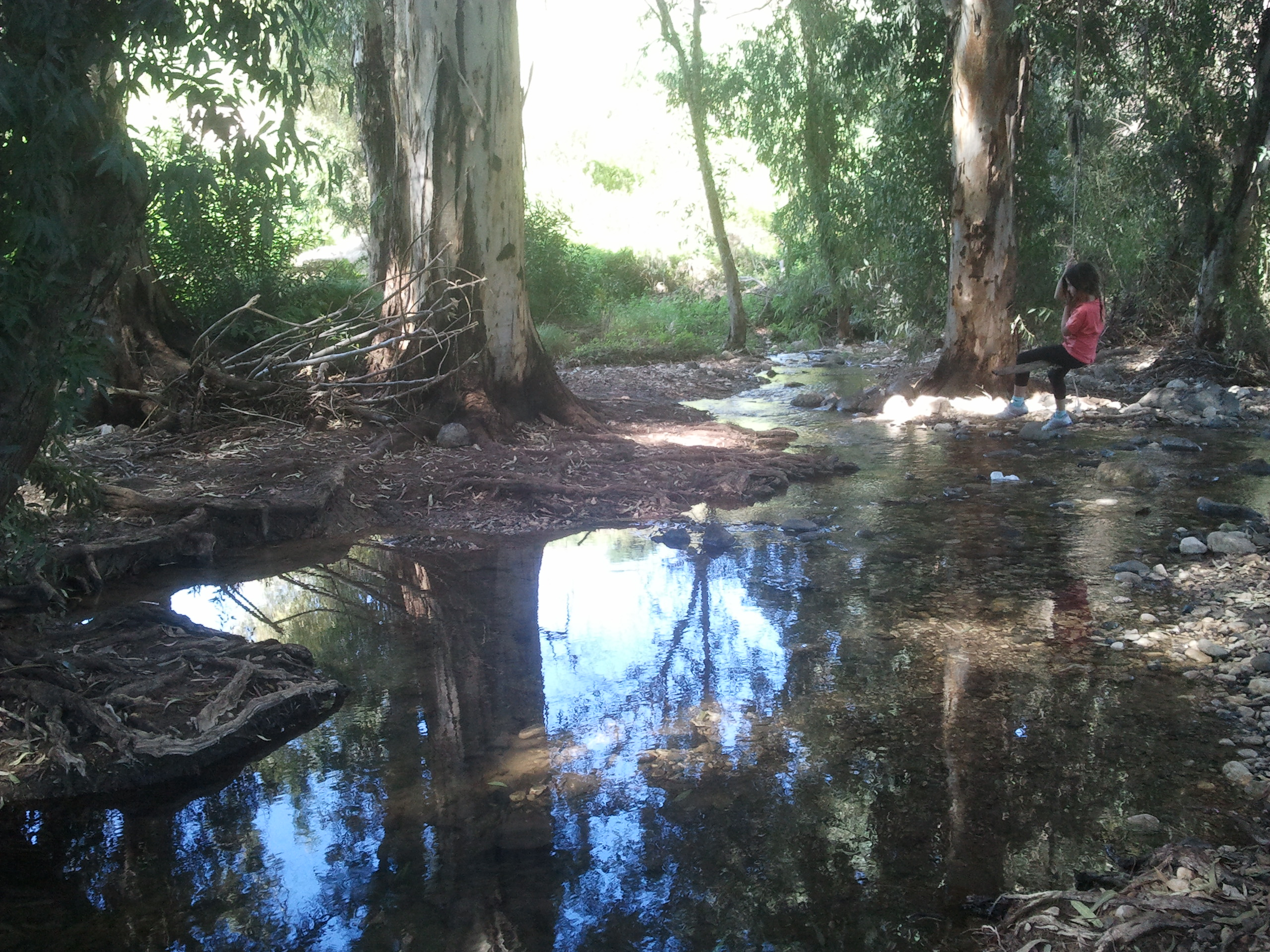 נחל מחניים זורם בגליל העליון, מהווה את גבולה הצפוני של רמת כורזים. בנחל נובע מעיין עין ירדה ליד חירבת ירדה